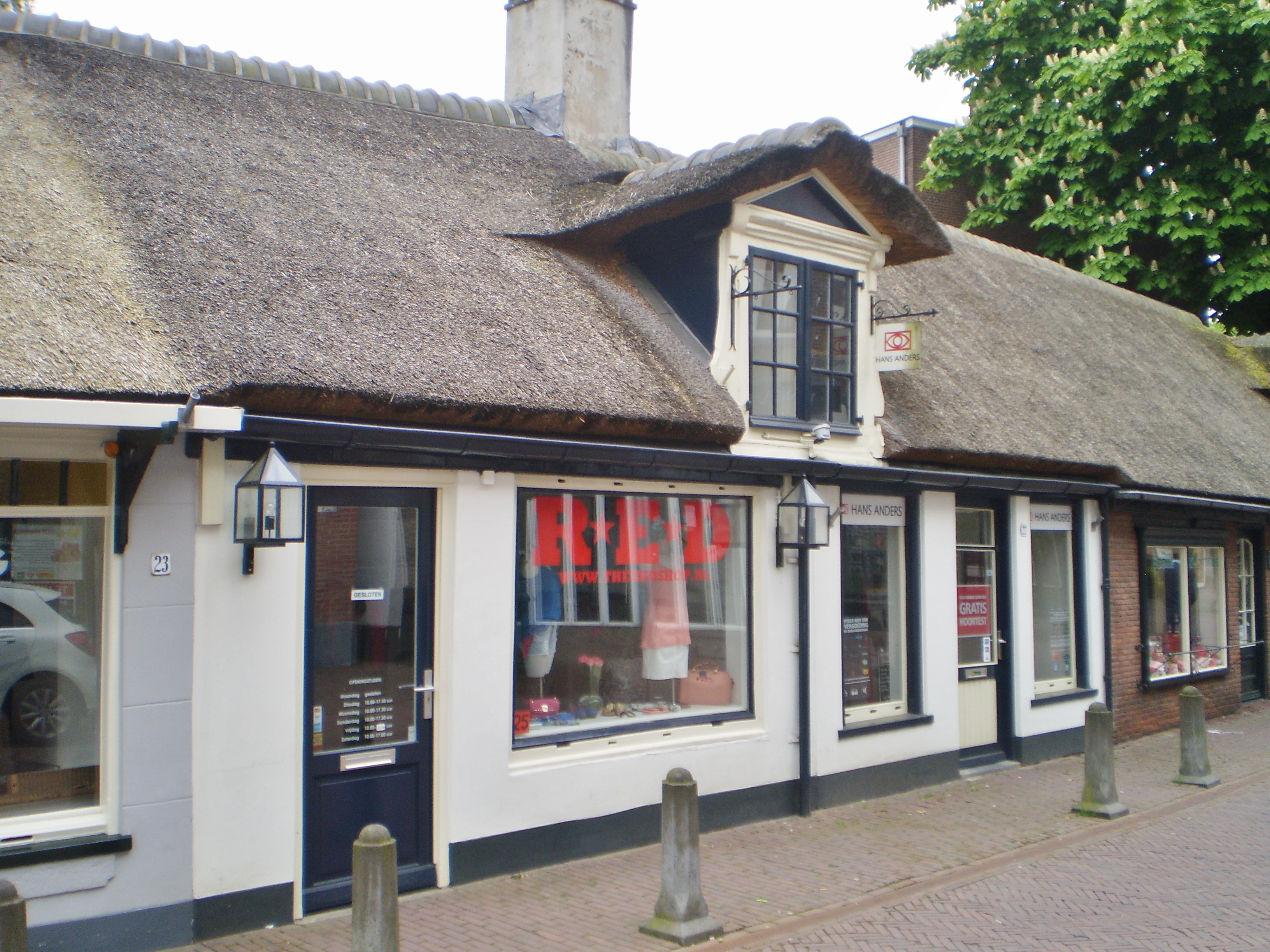 'De rieten dakjes", de panden 19 tot 31 zitten aan elkaar vast gebouwd